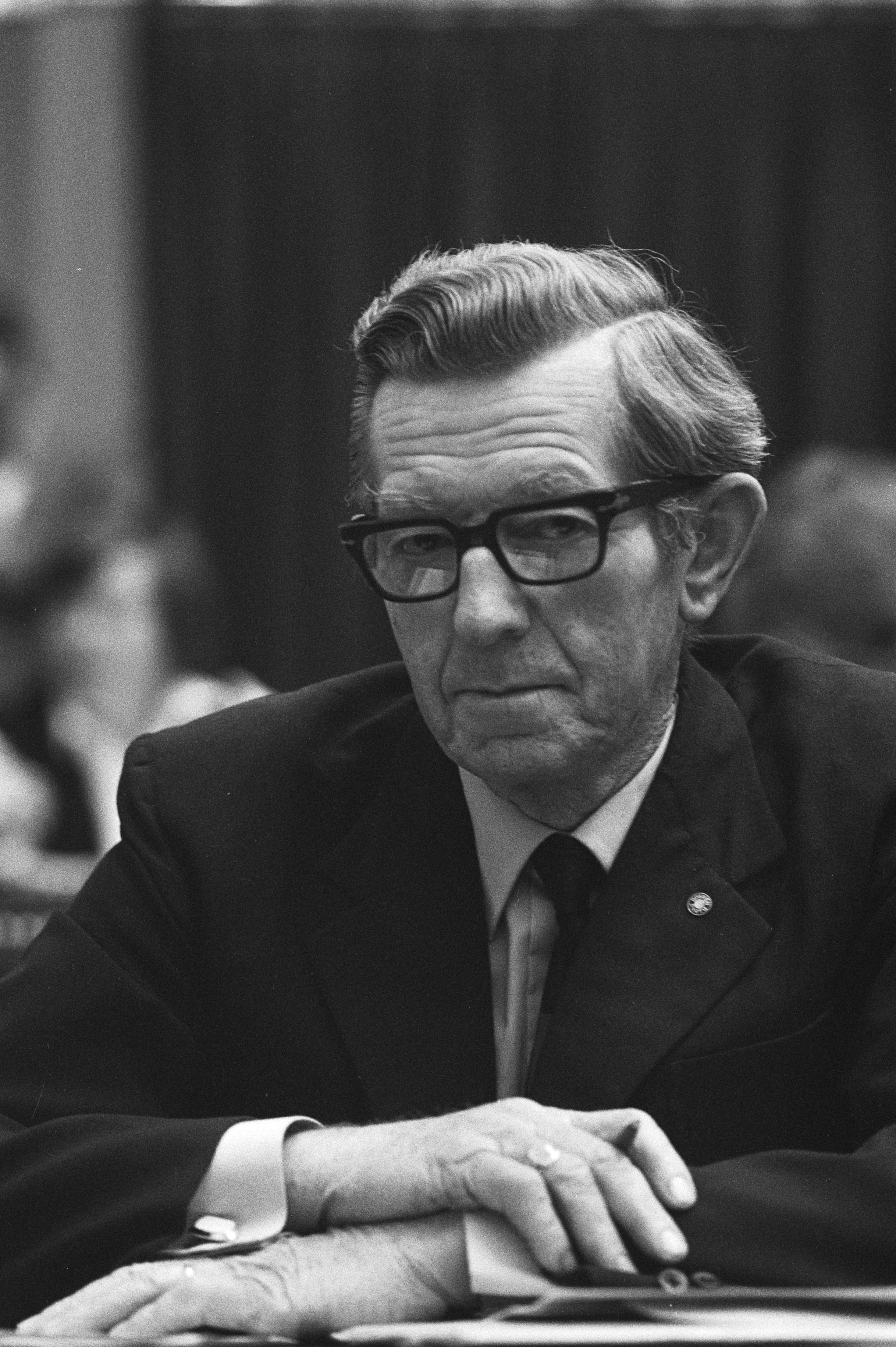 Collectie / Archief : Fotocollectie Anefo Reportage / Serie : Tweede Kamer behandelt algemene beschouwingen Beschrijving : Tweede ronde, Boer Koekoek Datum : 10 oktober 1980 Locatie : Den Haag, Zuid-Holland Trefwoorden : overheidsbegrotingen, parlementaire debatten, parlementariërs, politiek Persoonsnaam : Koekoek, Hendrik Instellingsnaam : Tweede Kamer Fotograaf : Dijk, Hans van / Anefo Auteursrechthebbende : Nationaal Archief Materiaalsoort : Negatief (zwart/wit) Nummer archiefinventaris : bekijk toegang 2.24.01.05 Bestanddeelnummer : 931-0765